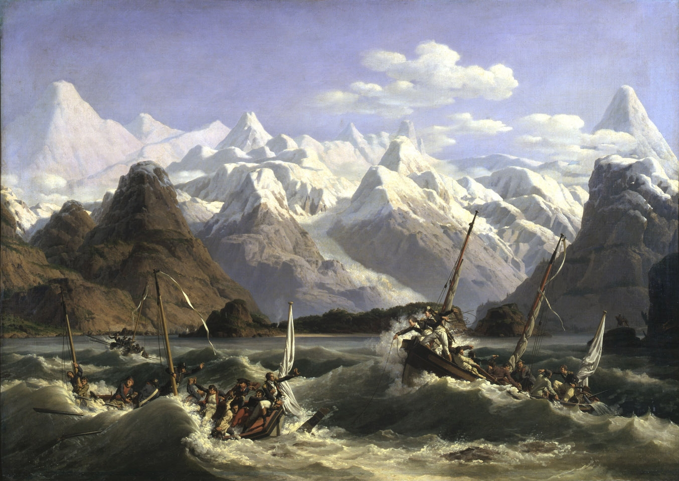 Tableau représentant le naufrage de deux chaloupes en Alaska lors de l'expédition La Pérouse en 1786. Tableau peint pour le marquis de La Borde dont les deux fils ont disparu dans le naufrage. Collection particulière, château de Jeurre.